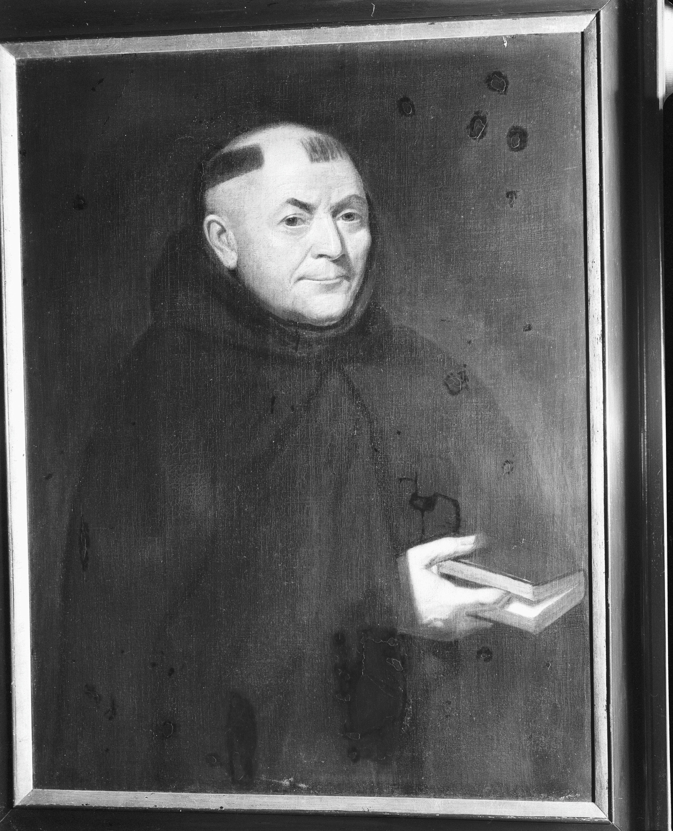 Pastorie Mozes en Aäronkerk: portret van 6de pastoor Cornelis de Vroom